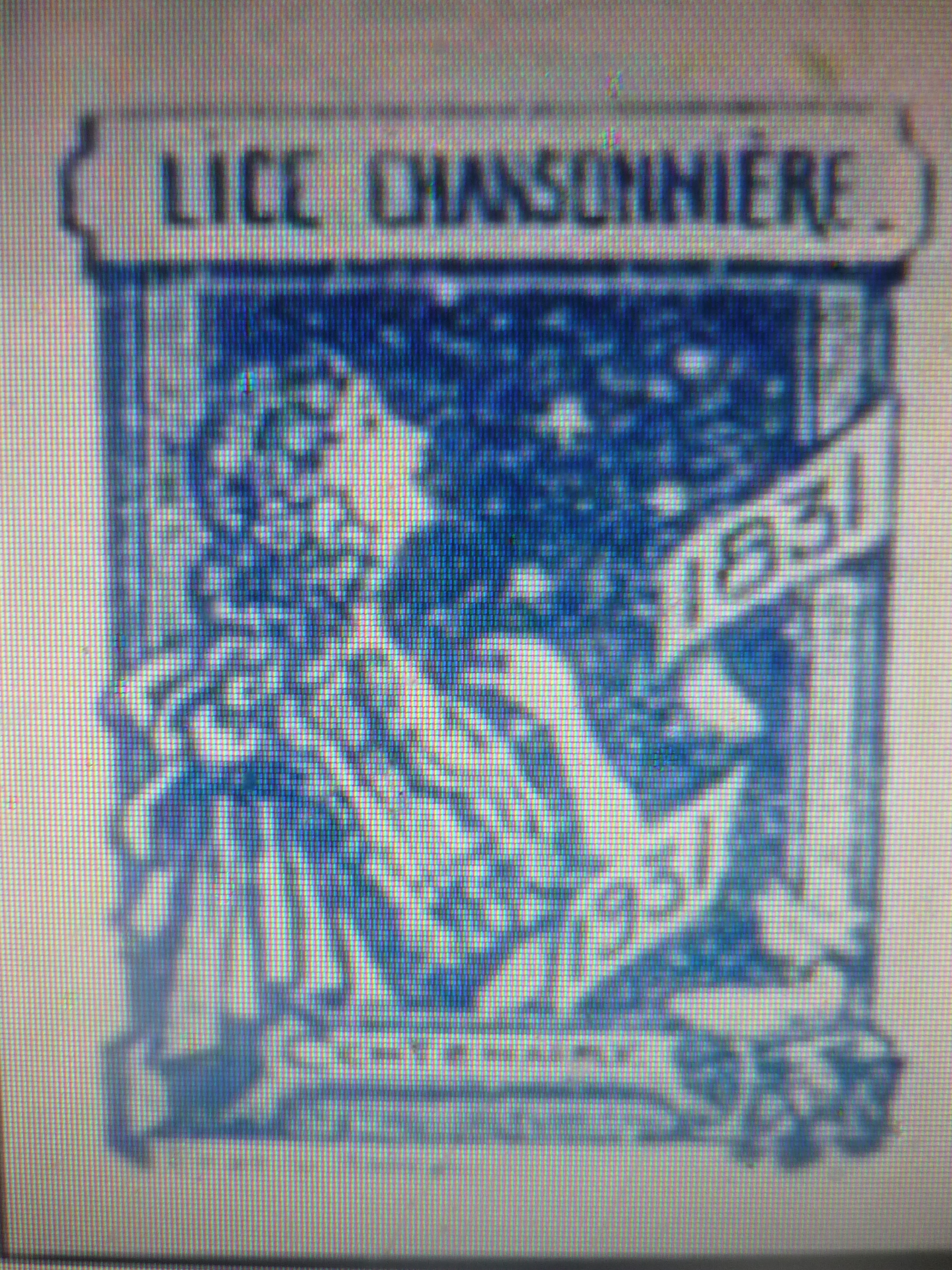 Ex libris sorti en 1931 à l'occasion du centenaire de la goguette de la Lice chansonnière.